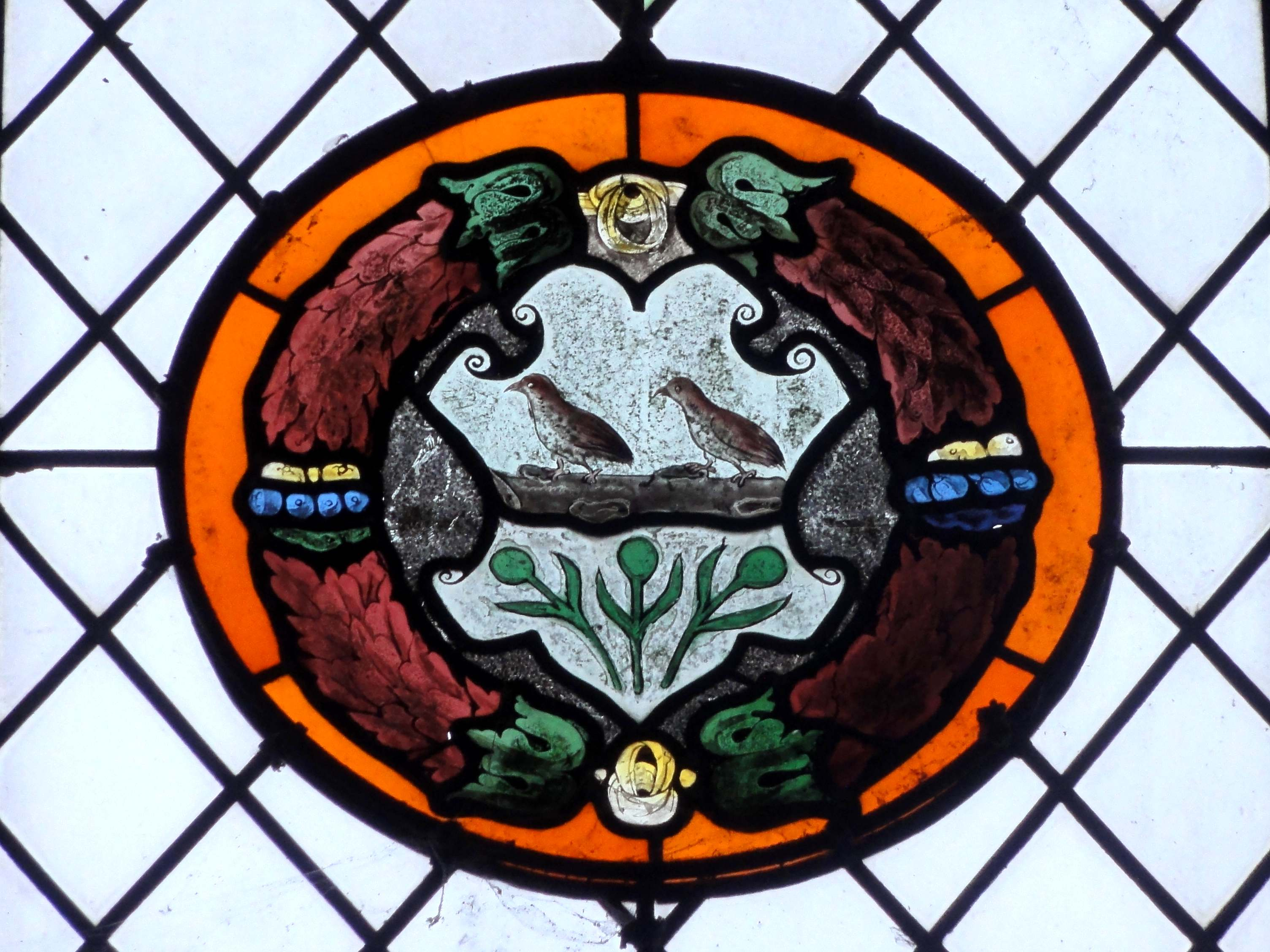 Mobilier de l'église - voir titre.